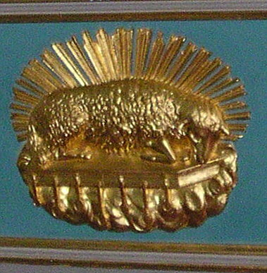 Darstellung des Buches mit 7 Siegeln am Hochaltar der Pfarrkirche St. Martin in Ensch (1838f erbaut, ob diese Darstellung genauso alt ist, weiß ich nicht)